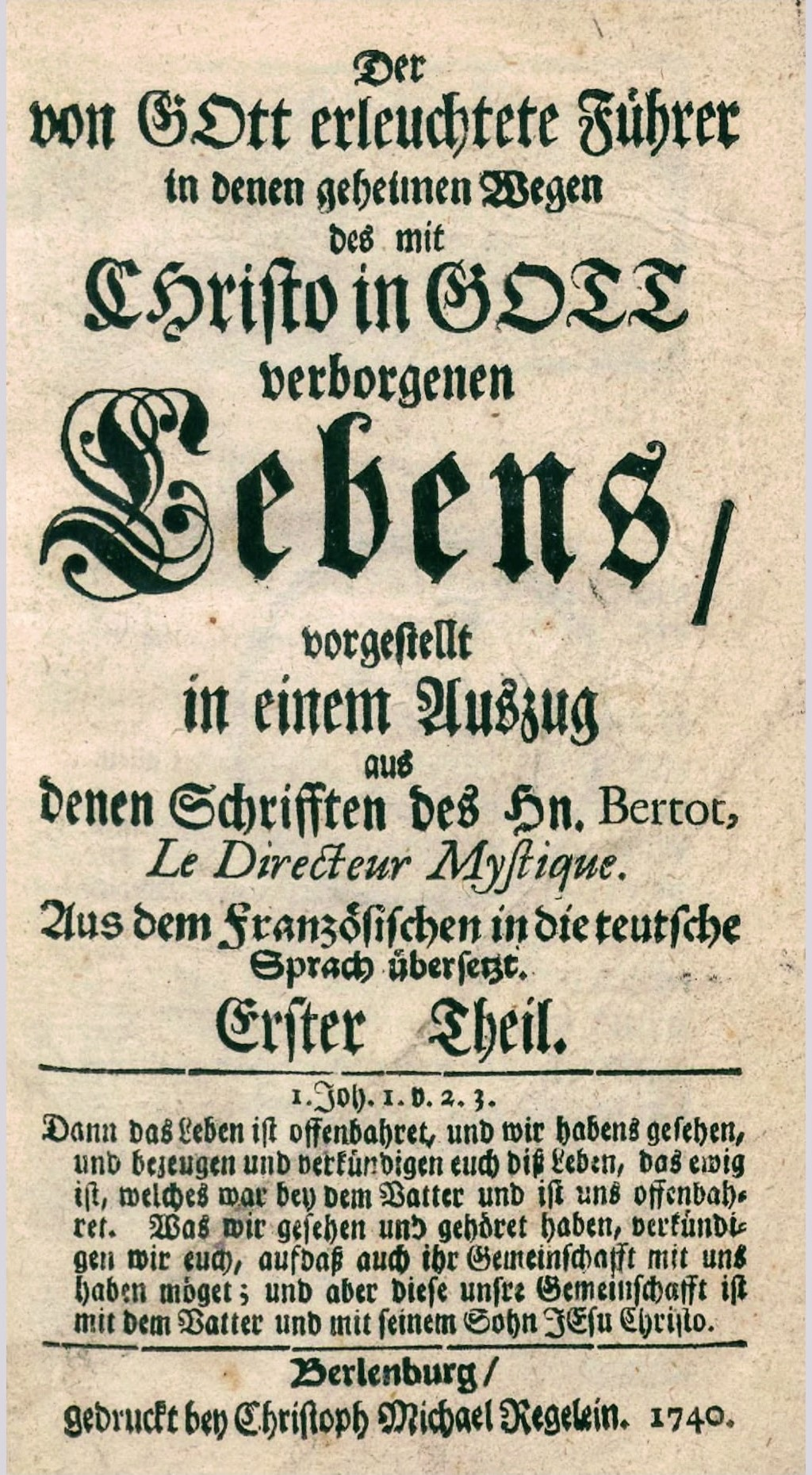 Titelseite des einzigen auf Deutsch erschienenen Buches (gedruckt 1740 und 1741) mit Übersetzungen einer Auswahl von Traktaten und Briefen Jacques Bertots, auf Französisch im Jahre 1726 erschienen unter dem Titel "Le Directeur Mystique".